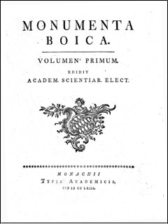 Monumenta Boica, Titelblatt von Band 1